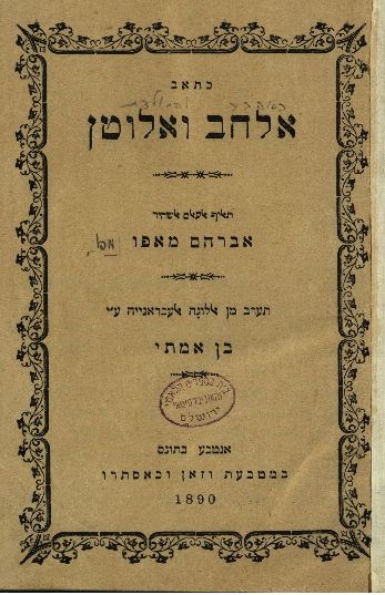 "al-hub wa al-watan", a Judeo-Arabic translation of "Ahavat Zion" (love of zion) by Abraham Mapu. The translator is the Jewish-Tunisian Journalist and writer Messod Maarek. Tunis, 1890.